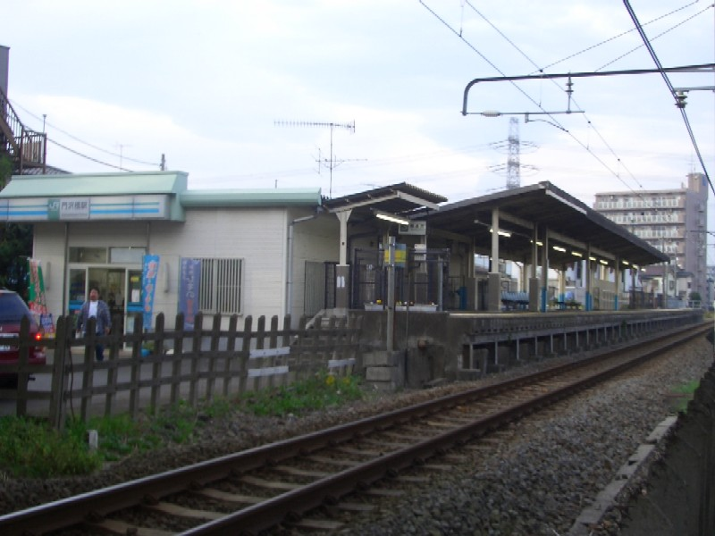 Kadosawabashi Station on JR Sagami Line, Ebina, Kanagawa 門沢橋駅 View looking from Chigasaki